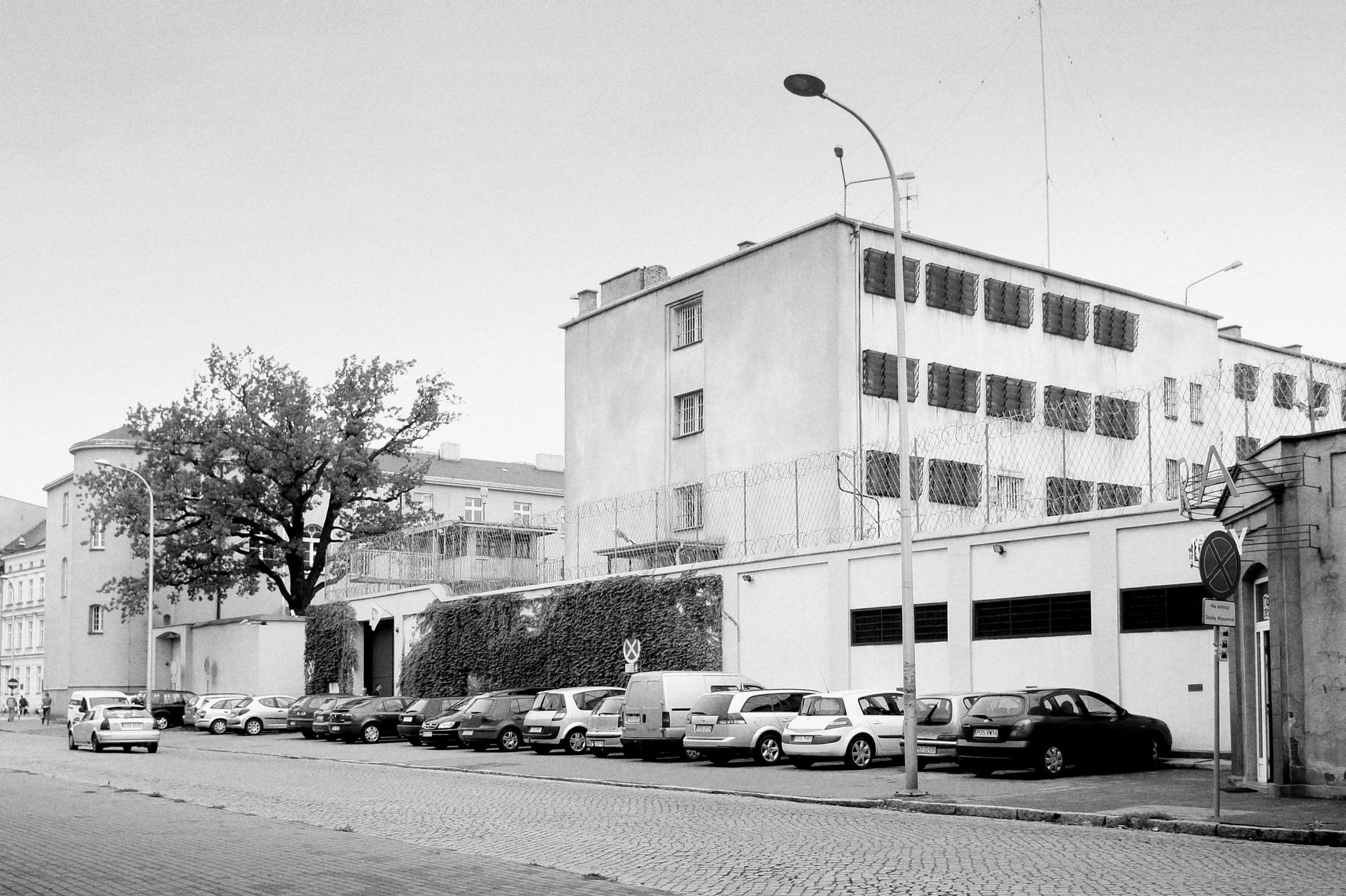 Areszt Śledczy w Ostrowie Wlkp. W latach 1874-1876 w celi nr 25 prusacy więzili Prymasa Polski kardynała Ledóchowskiego. Obiekt przebudowano w pierwszej połowie lat 70 XX w. W okresie stanu wojennego areszt stał się miejscem internowania działaczy “Solidarności” ( m.in. Edwarda Borowskiego z Gorzowa Wlkp.)